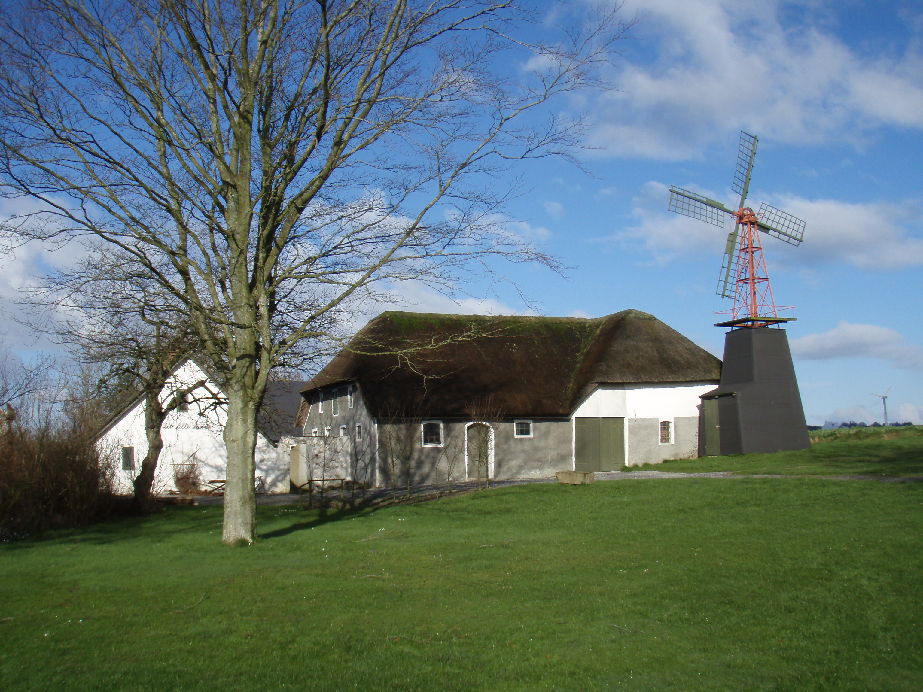 Museumsgården "Det Lille Land"